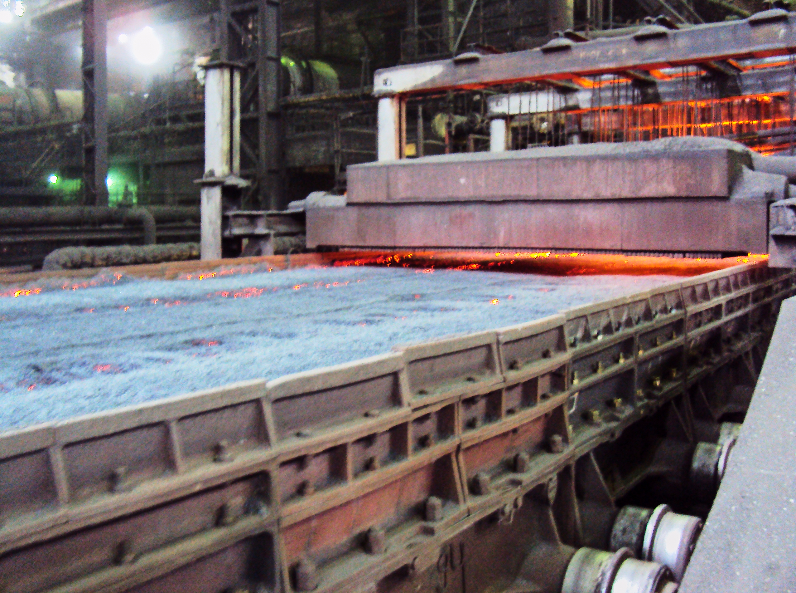 Зажигательный горн агломашины